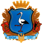 Bus'k COA, Lviv region, Ukraine Буськ - у синьому полі срібно-чорний лелека з червоним дзьобом та ногами. Старий герб. Перезатверджений 1990 р.